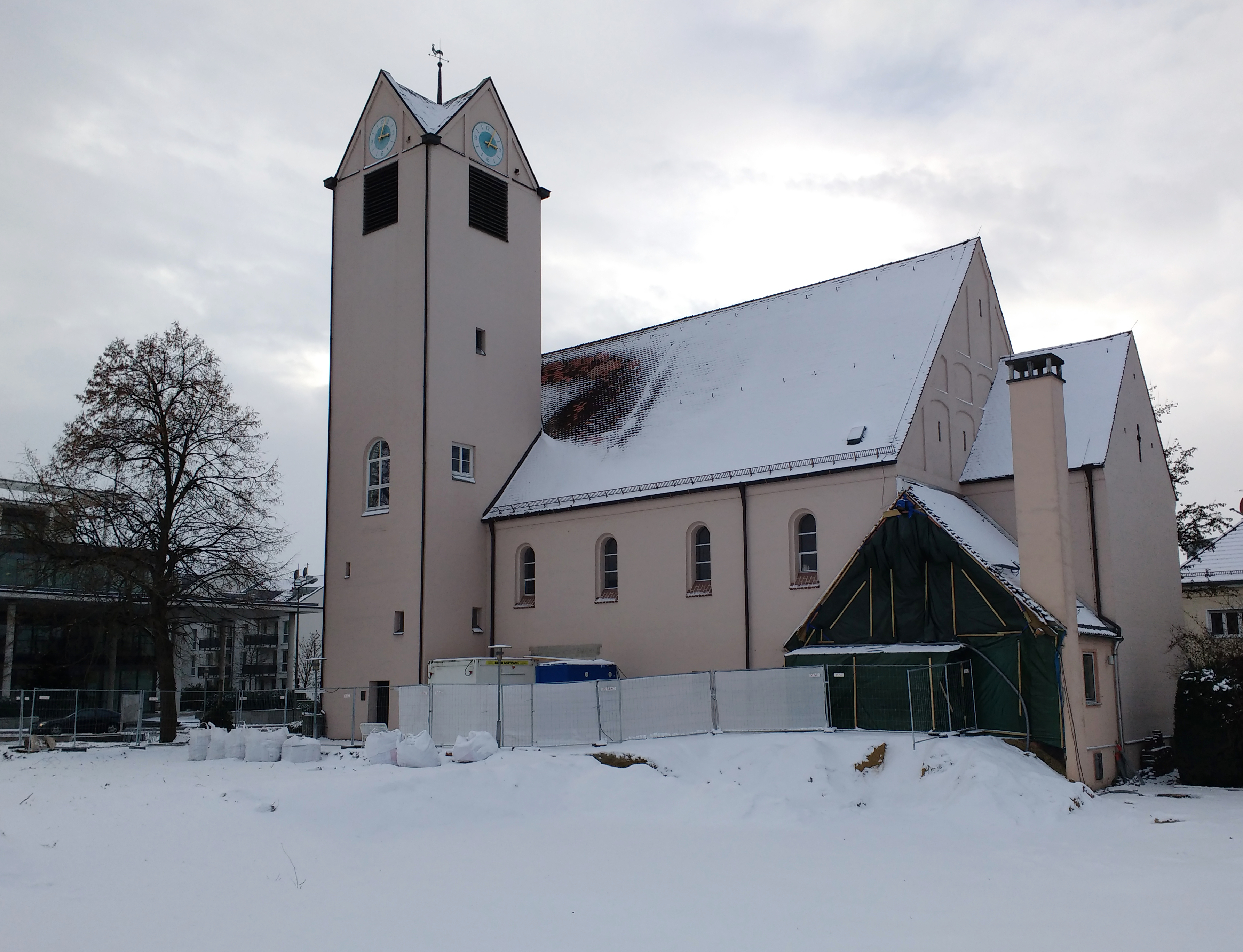 Christi Himmelfahrt; Evangelische Kirche in Freising